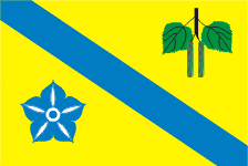 Berezner